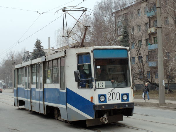 KTM-8 200 in Luhansk